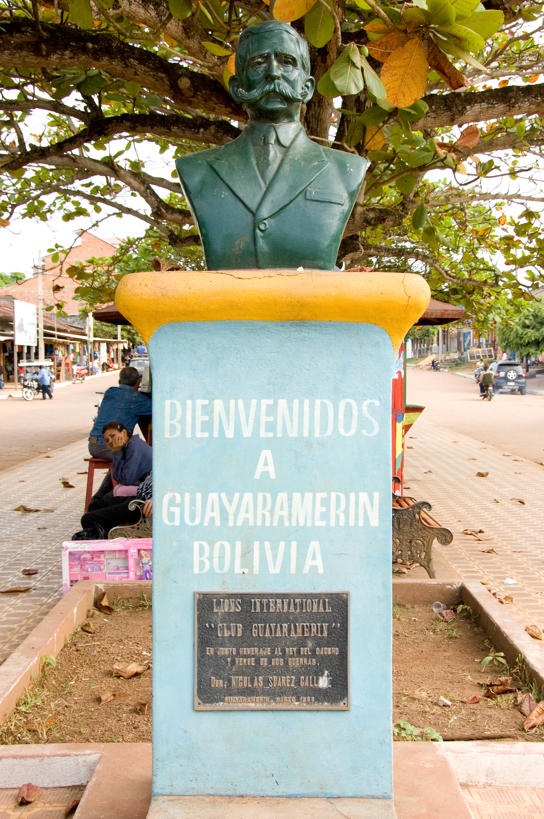 Guayaramerín, Beni, Bolivien, Ortseingang vom Hafen aus gesehen mit Statue des Kautschukbarons Nicolás Suárez Callaú. Inschrift (weiss auf hellblau): Bienvenidos a Guayaramerin Bolivia Zusatztafel (golden auf schwarz): Lions international "Club Guayaramerin" En justo homenaje al rey del gaucho y herue de dos guerras. Don. Nicolas Suarez Call* Guayaramerin Marzo 1998 * Inschrift beschädigt, ursprünglich Callau